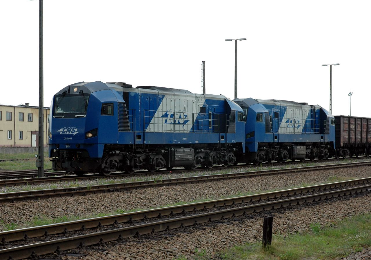 Lokomotivy ST40 LHS, Szczebrzeszyn, Polsko